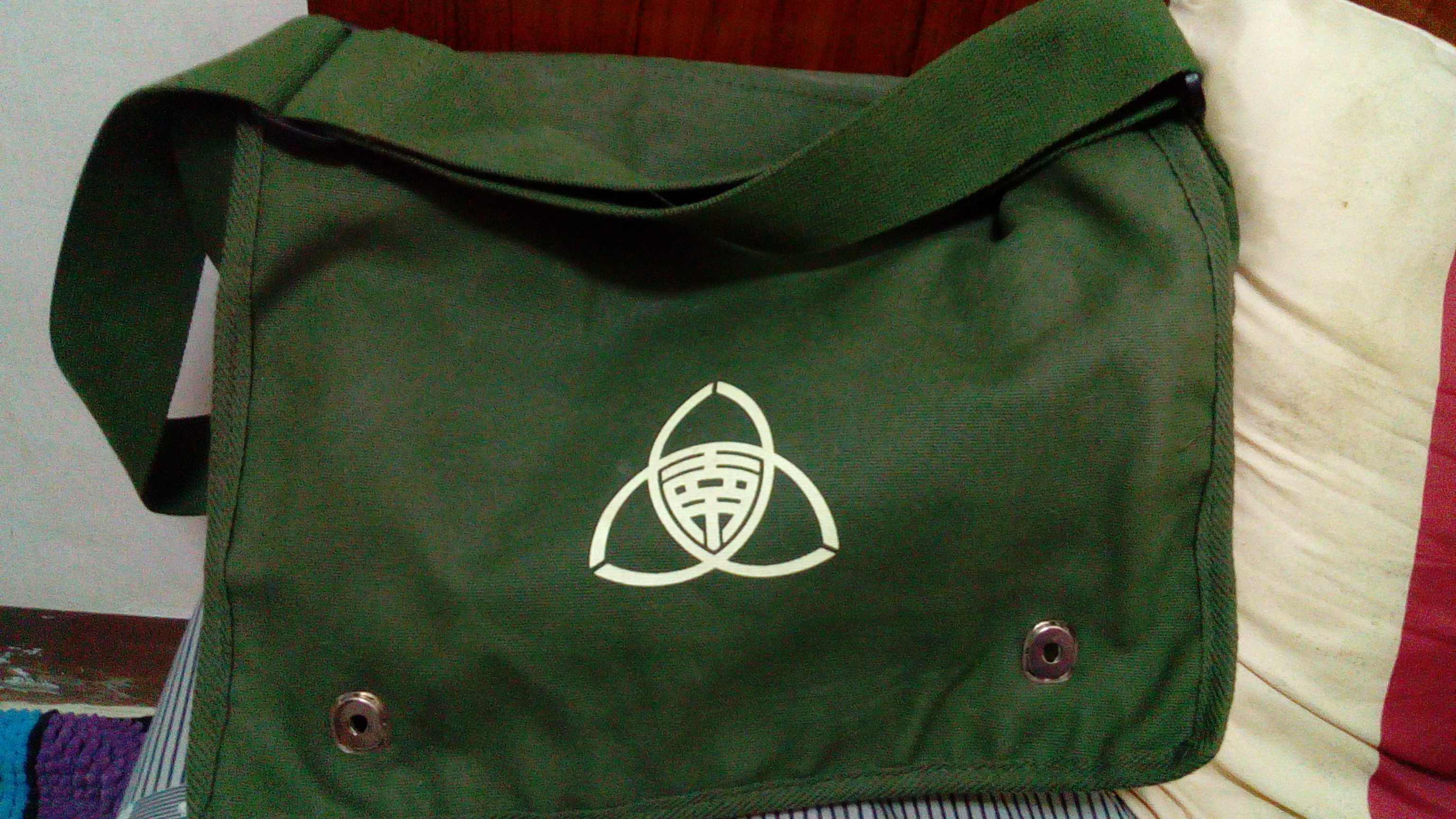 平常上學用的書包 和制服一樣 是學生的必需品